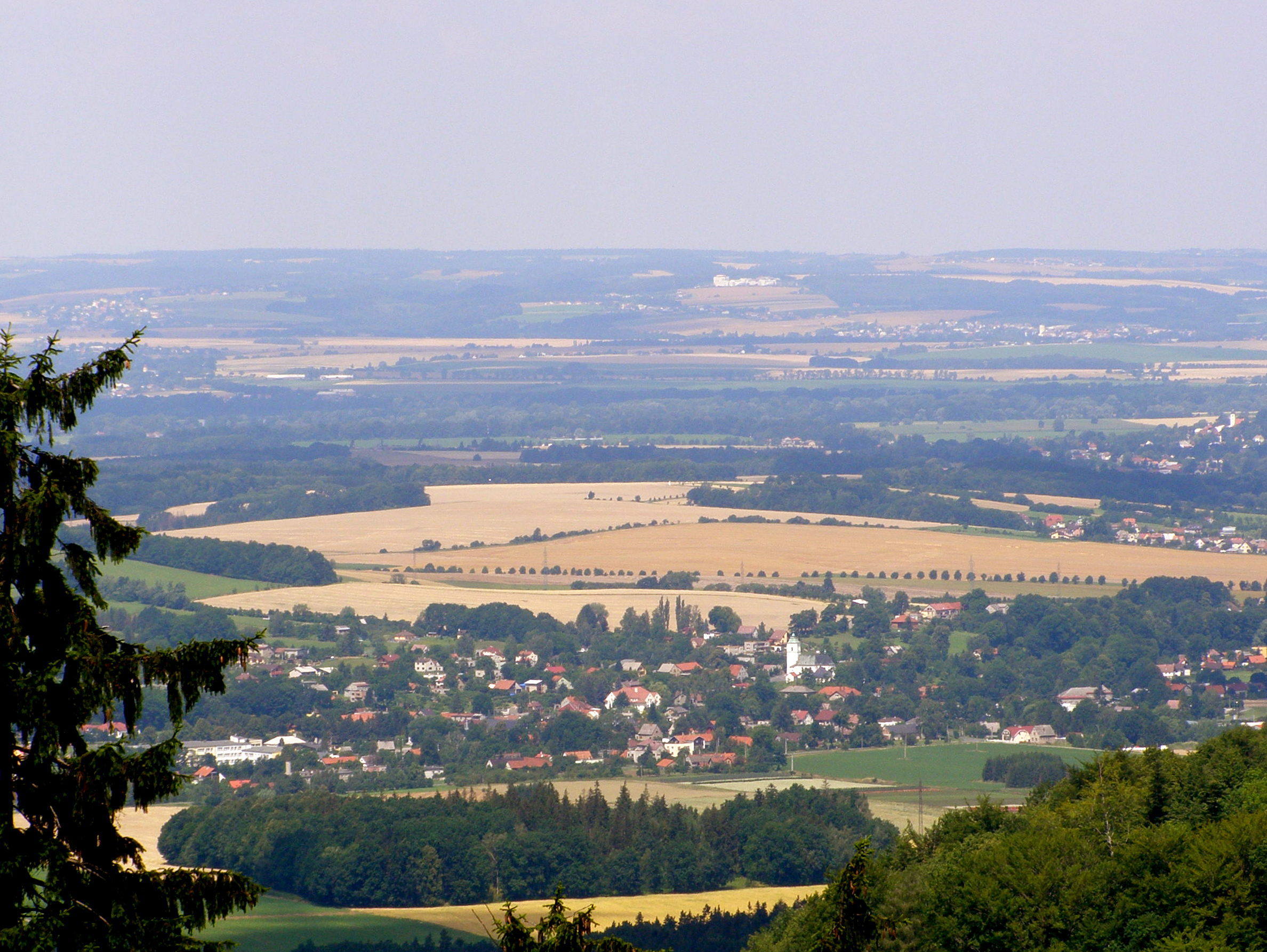 Staříčská pahorkatina, v popředí Fryčovice, pohled z Palkovických hůrek